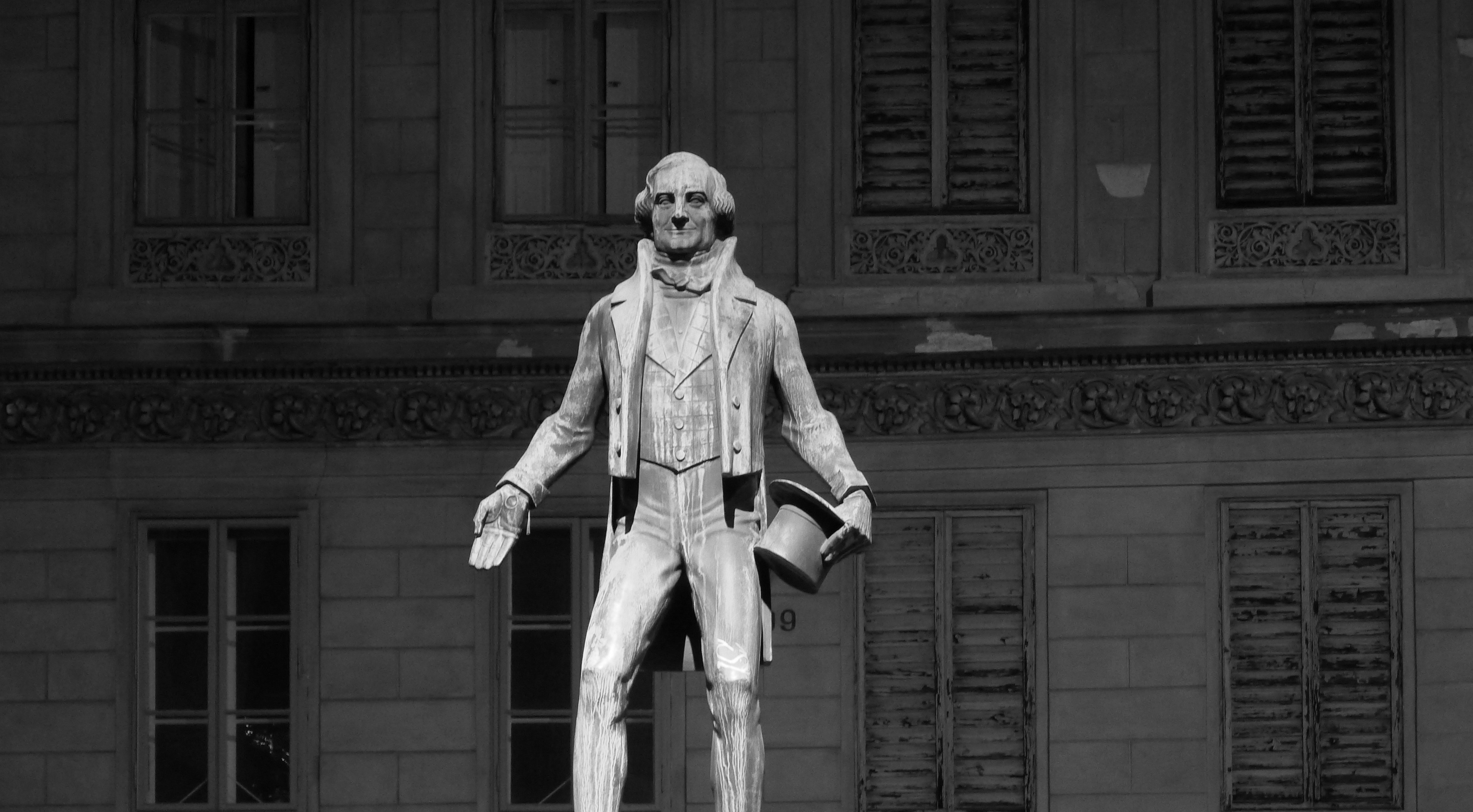 Persönlichkeitsdenkmal, Johann Nestroy-Denkmal